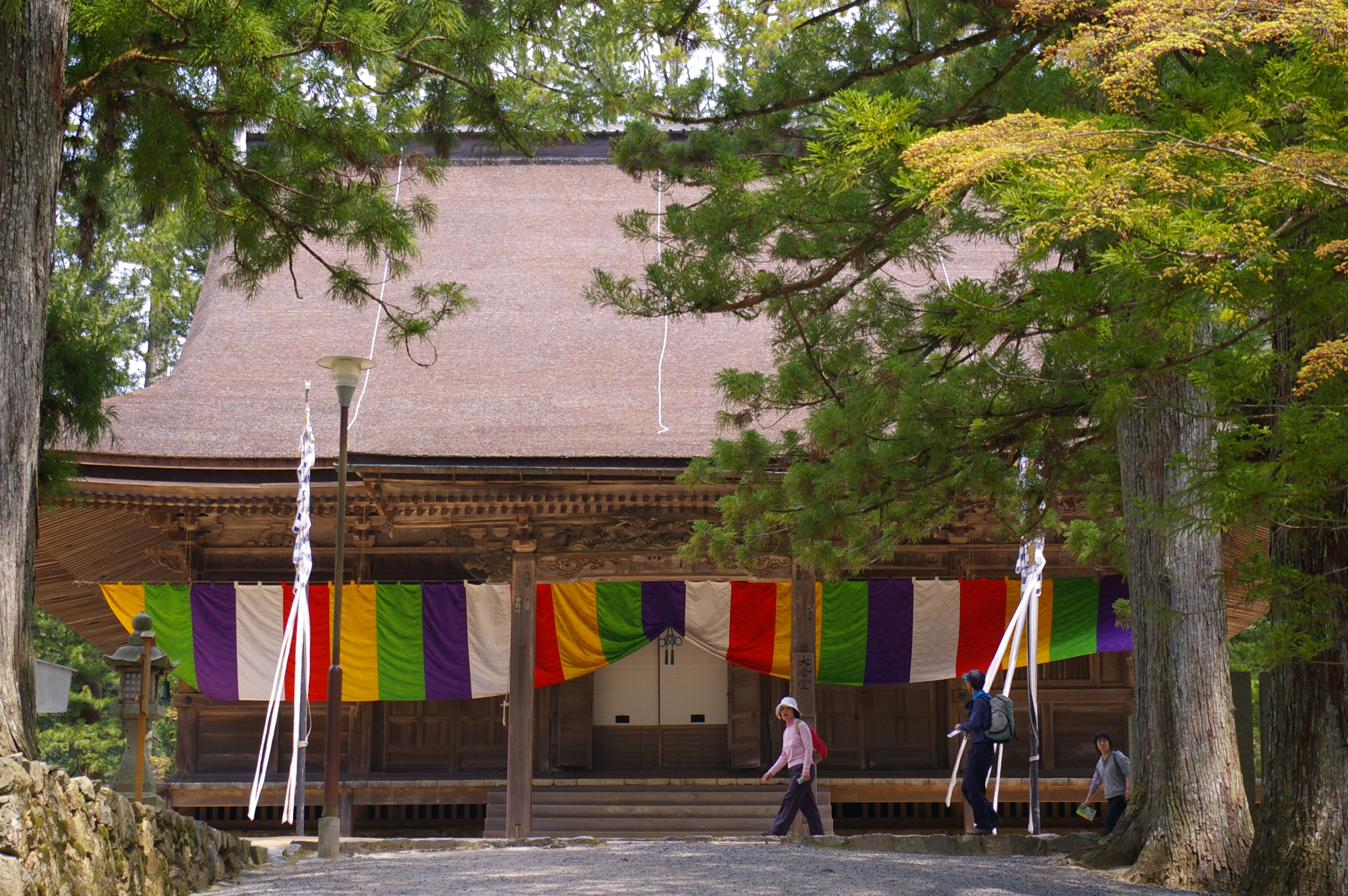 Daiedo_Danjogaran_Koyasan_Kongobuji-temple, Wakayama prefecture, Japan